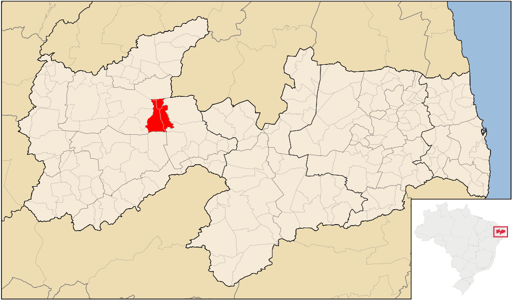 Mapa dos municípios integrantes da Comarca de Malta-PB.